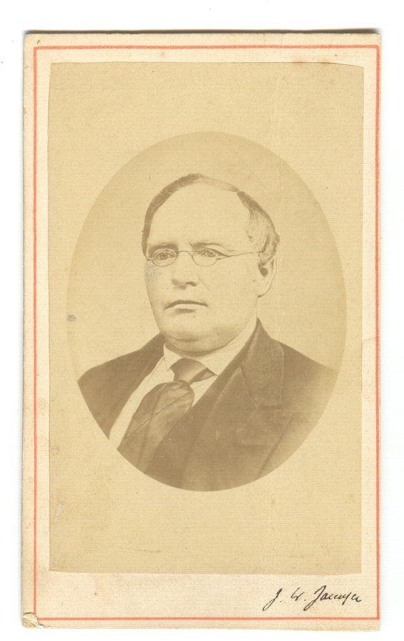 Muuseumikogu Fotokogu Olemus foto Originaal originaal Säilivus rahuldav